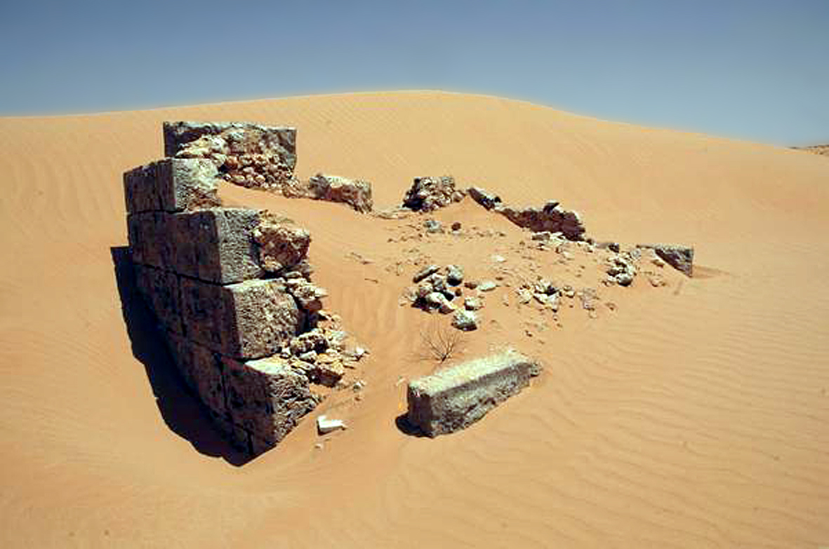 Das Kastell Gholaia, das durch antike Quellen auch als castra Chol(aia), [G]olas sowie in der Tabula Peutingeriana als Chosol überliefert ist, war ein römisches Militärlager, das für Sicherungs- und Überwachungsaufgaben am vorderen Limes Tripolitanus, einem tiefgestaffelten System von Kastellen und Militärposten, in der römischen Provinz Africa proconsularis zuständig war. Blick auf den traurigen Rest der Porta principalis sinistra, die fast 200 Jahre zuvor noch in einem ausgezeichneten Zustand war und dem Steinraub durch Osmanen und Italiener zum Opfer gefallen ist.